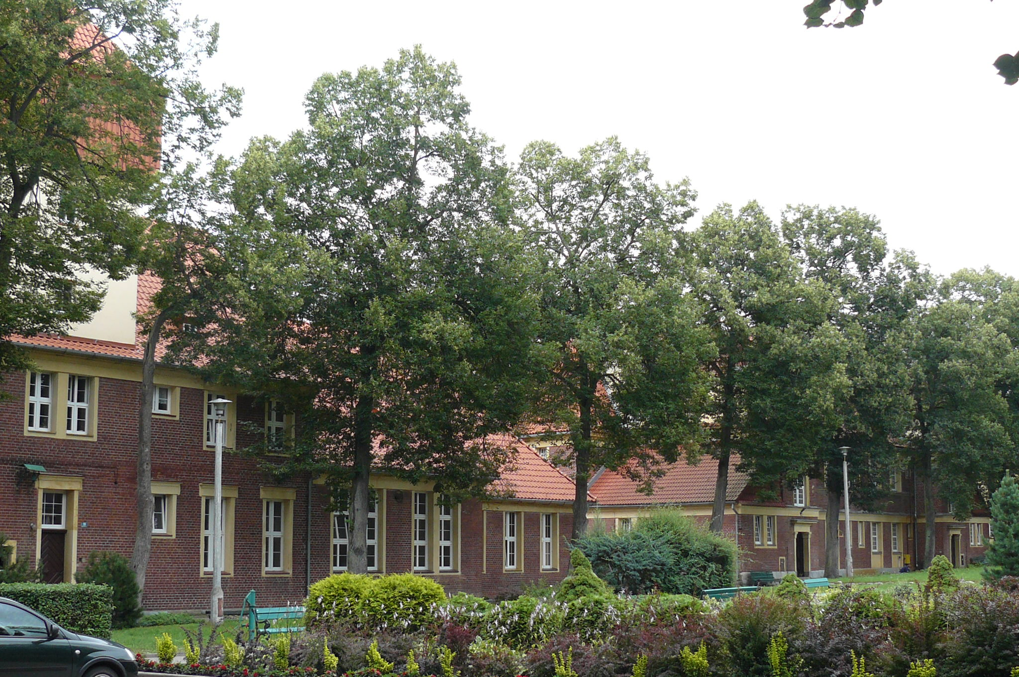 Młodzieżowy Ośrodek Wychowawczy im. Janusza Korczaka w Antoniewie (1914r., brama z 1938r.).